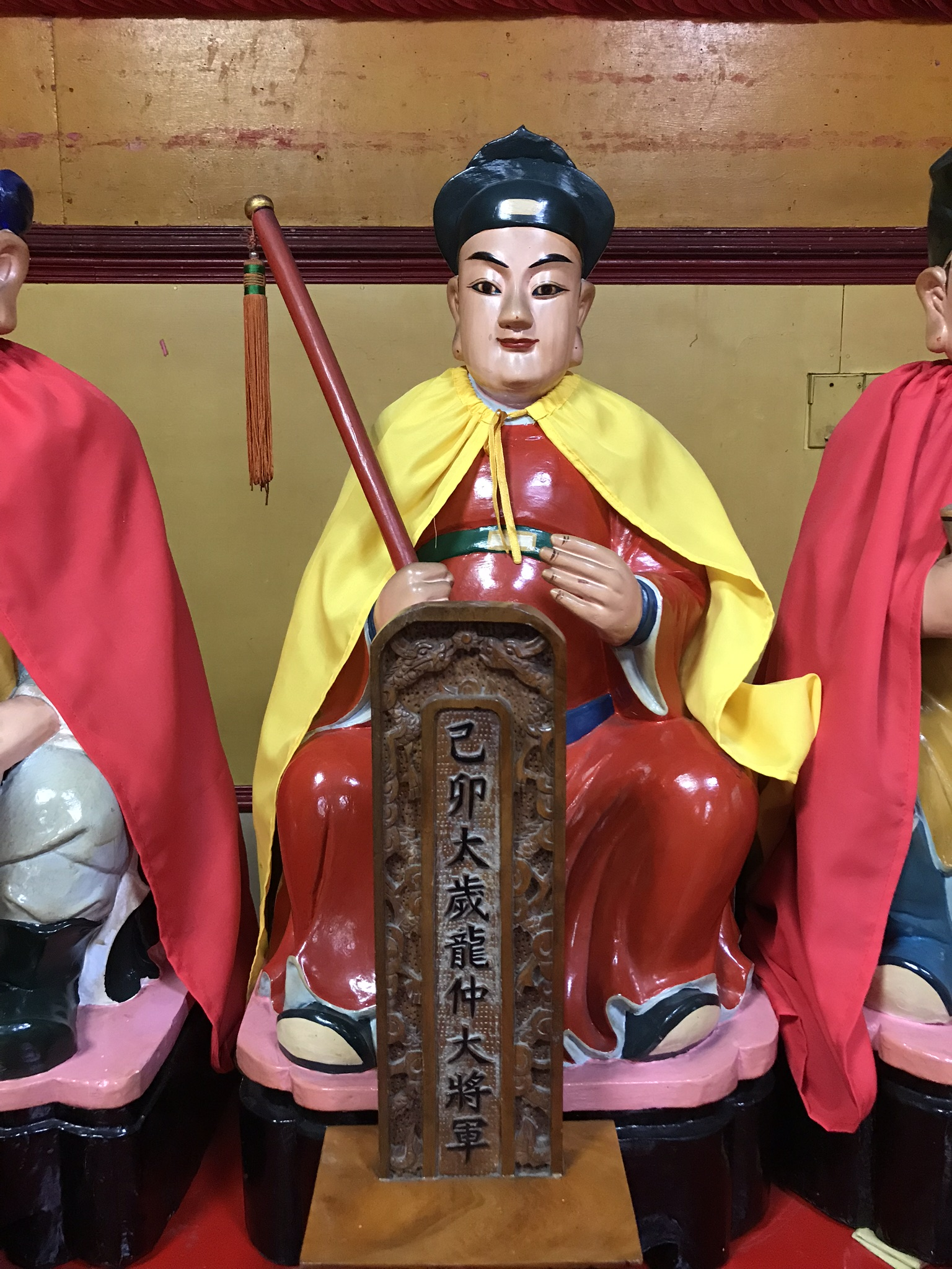 麻豆代天府己卯太歲龍仲大將軍神像